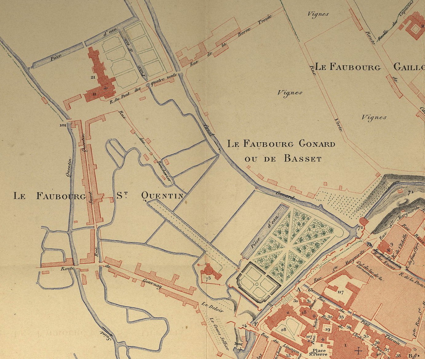 cadre fait sur le faubourg st quentin File:Plan V. Lhuillier, Beauvais en 1789, dressé en 1889, coll. SAO.jpg